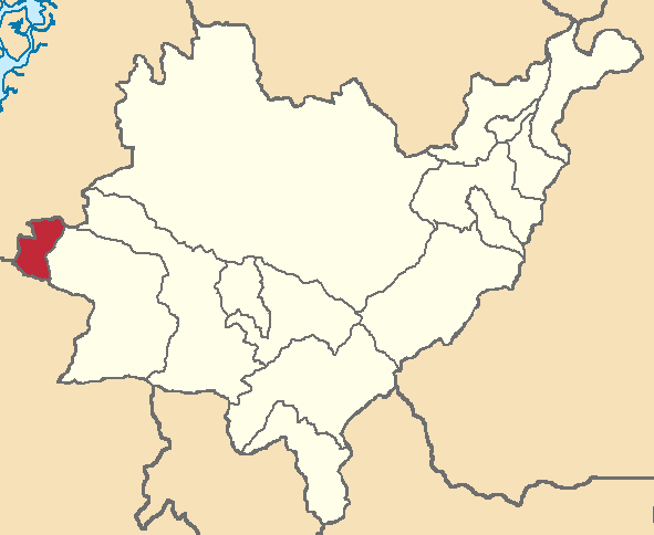 Mapa localizacor del cantón en Azuay, Ecuador